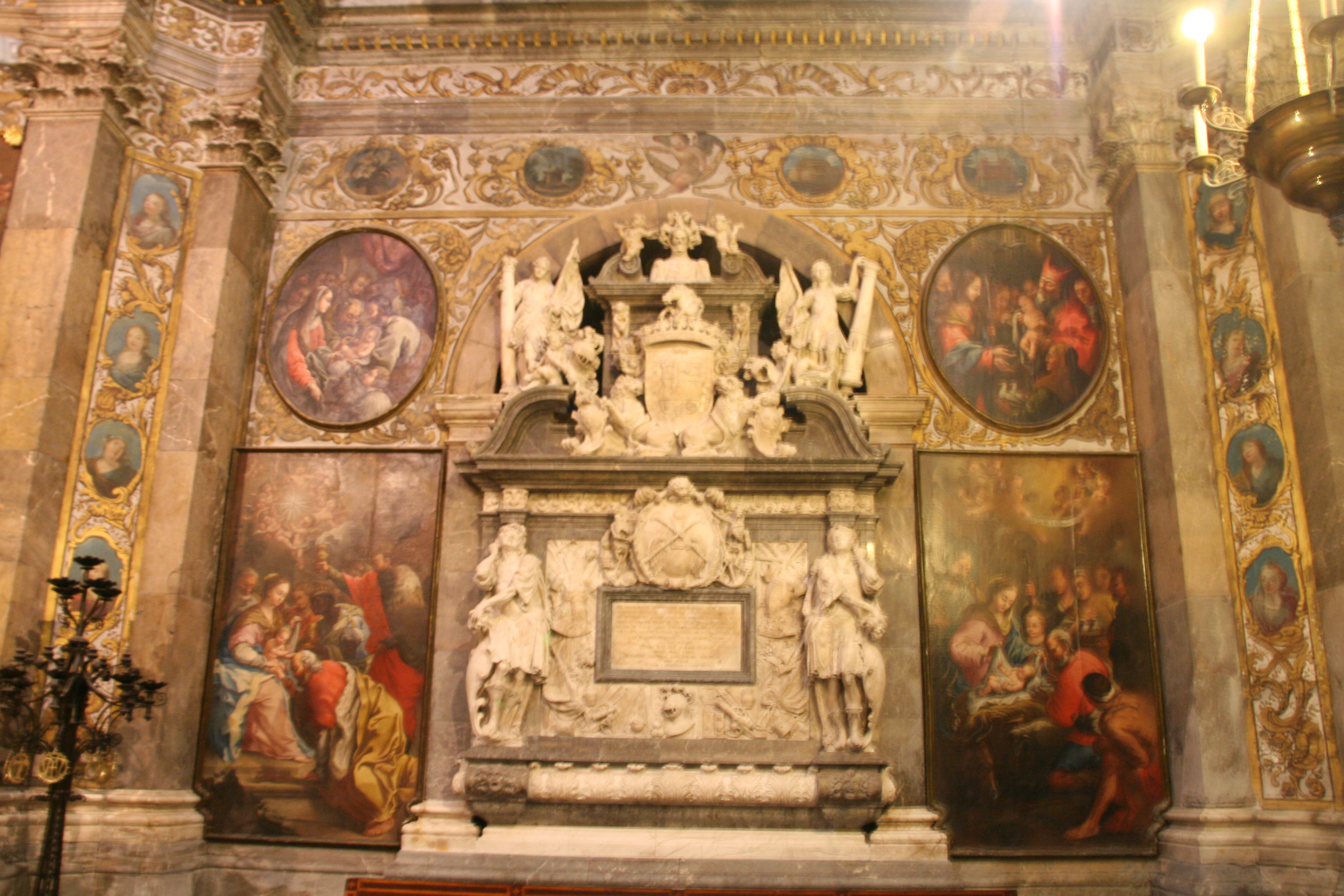 Sepulcre dels germans de Diego Girón de Rebolledo